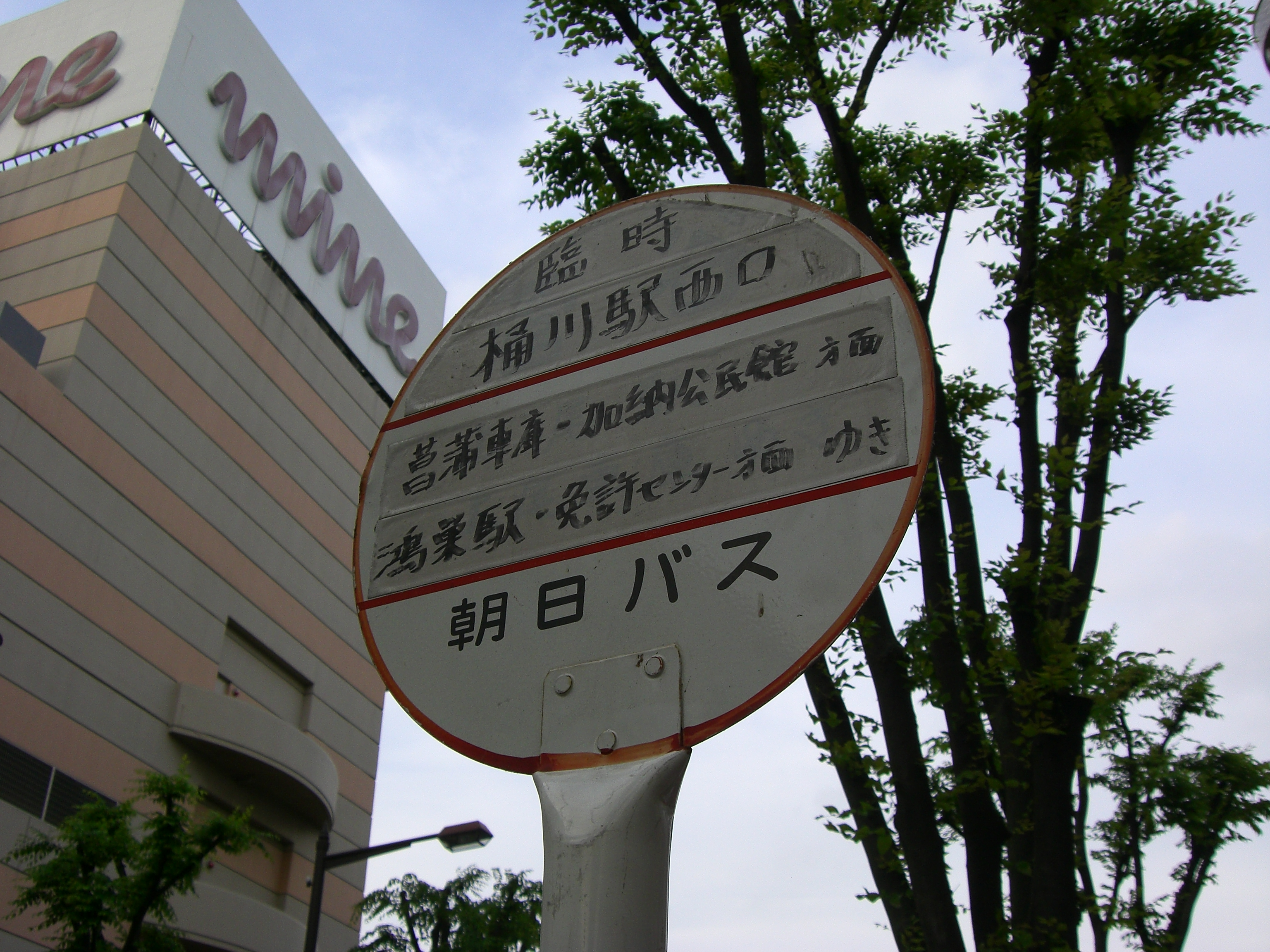 桶川祇園祭時においての臨時バス停。 開催地となる桶川駅東口周辺では車の通行ができなくなるため、代替バス停として桶川駅西口にバス停が設置される。